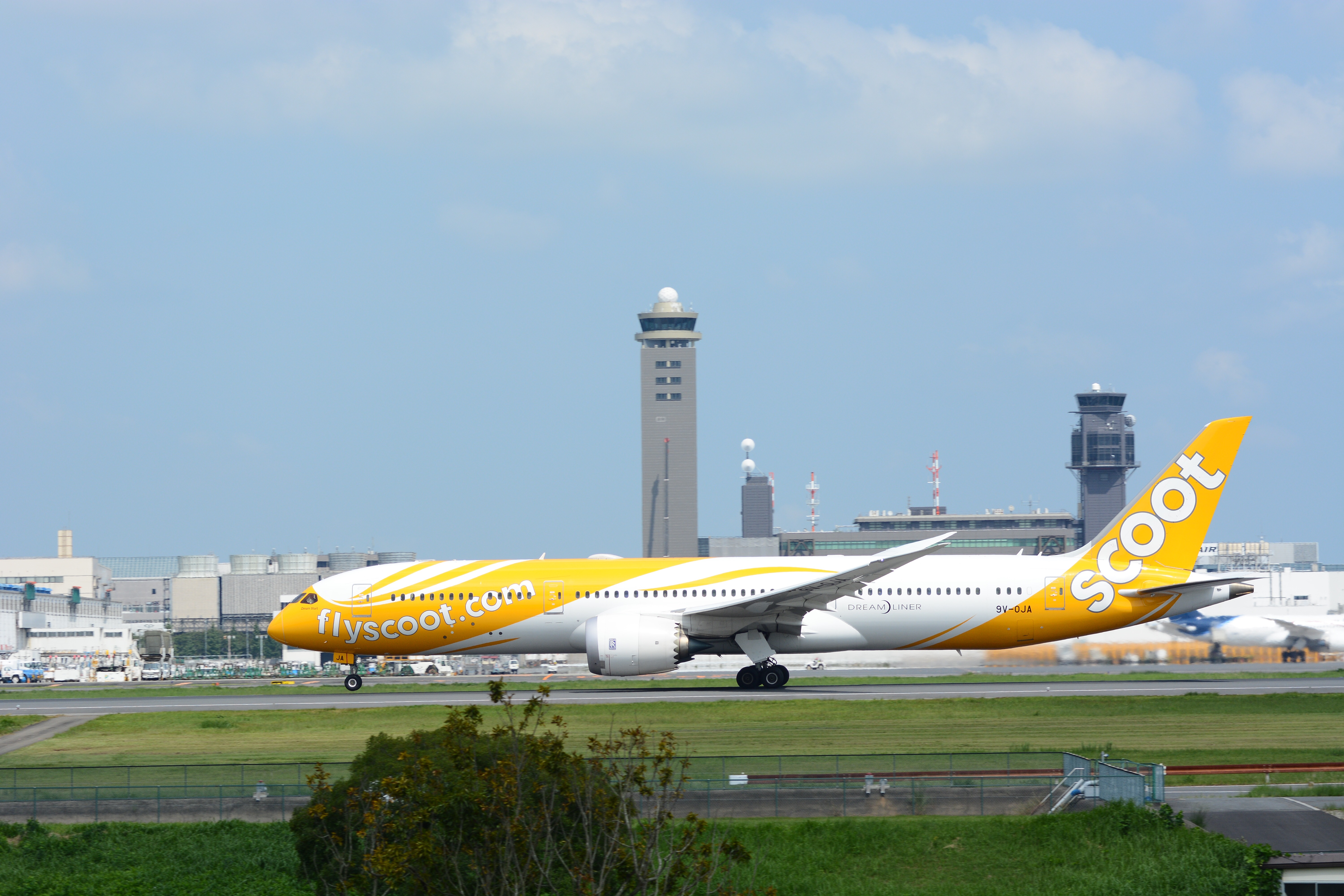 Scoot, Boeing 787-9 9V-OJA NRT